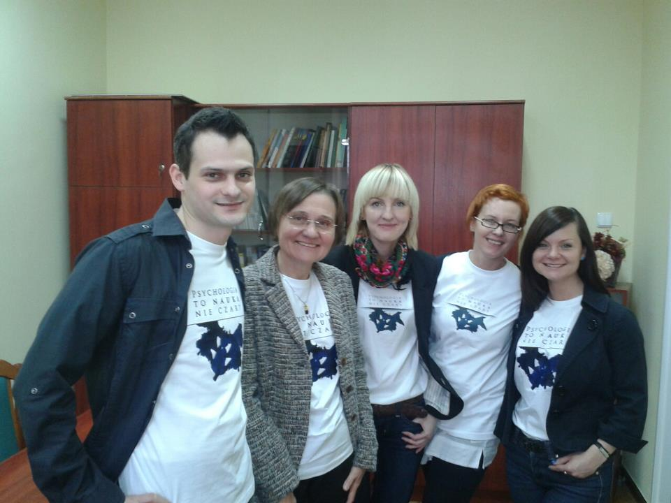 Uczestnicy akcji "Psychologia to nauka nie czary" z Instytutu Psychologii UŁ